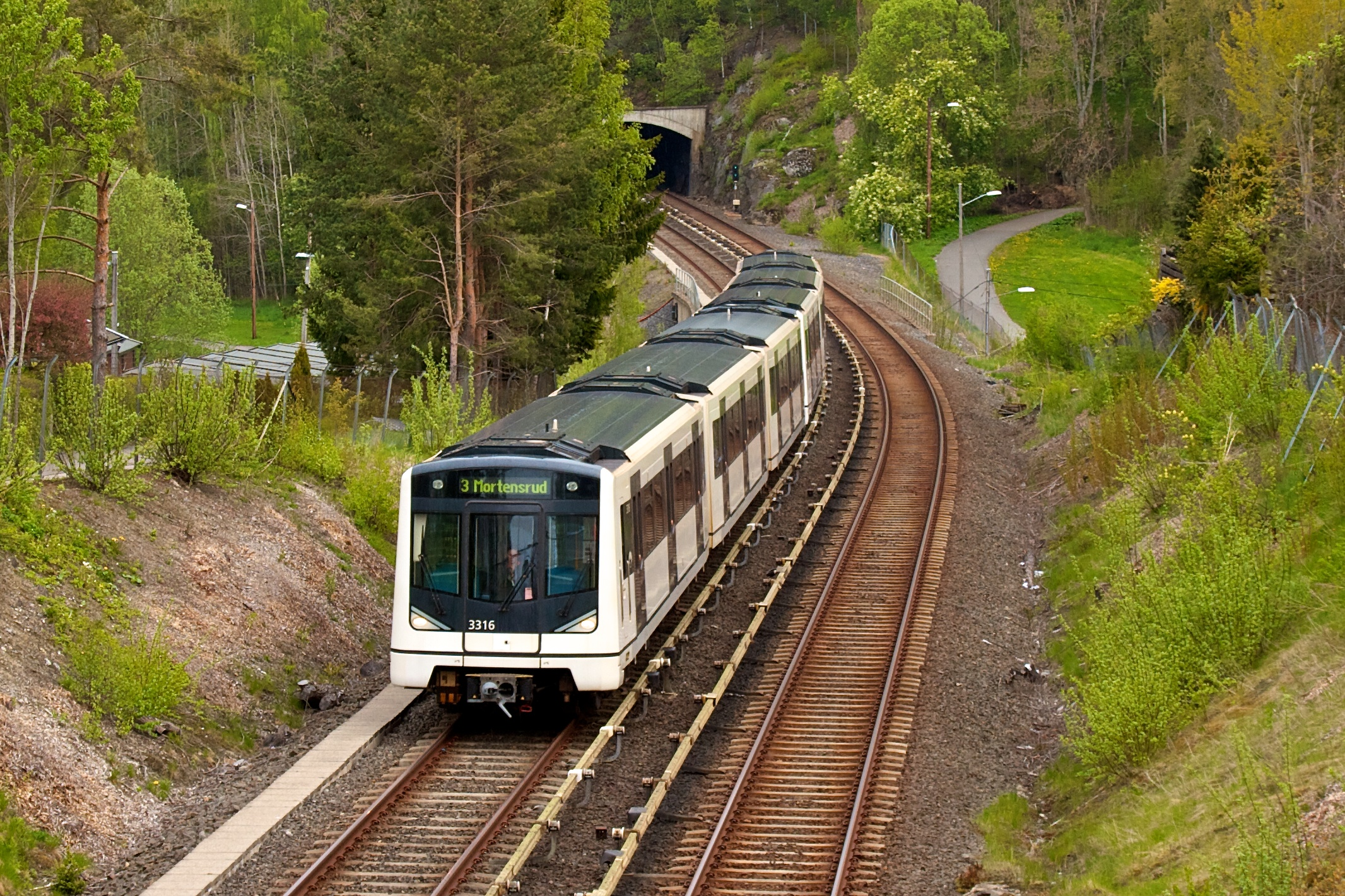 MX3000 mellom Bogerud og Skullerud